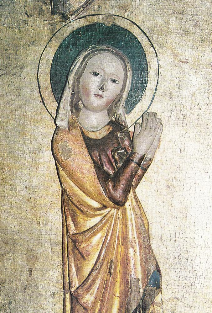 Silte kyrka.Maria (Ur altarskåpet fr 1200-talet)